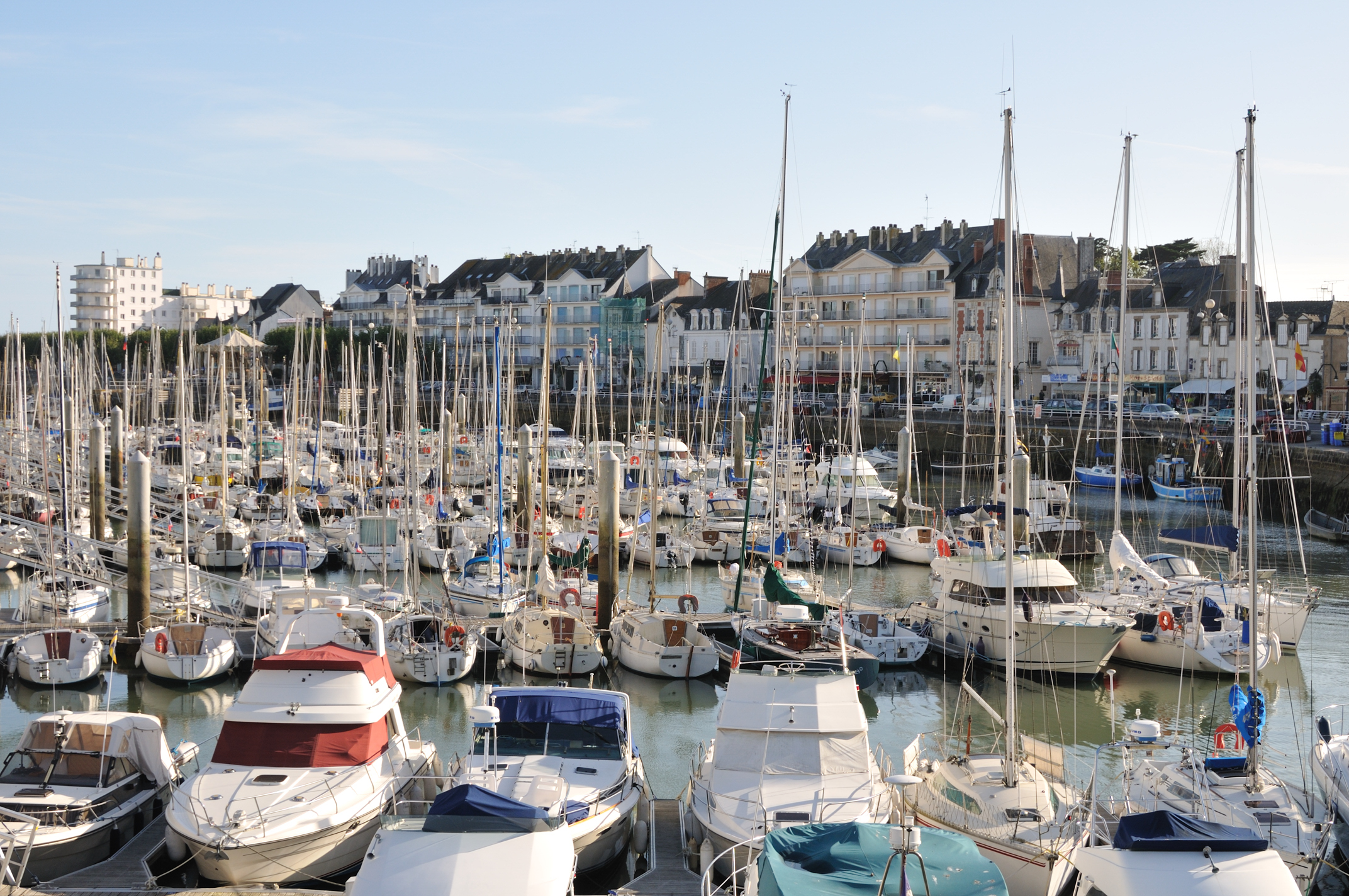 Port de La Baule - Le Pouliguen, Loire-Atlantique, France (La Baule à droite, Le Pouliguen à gauche)